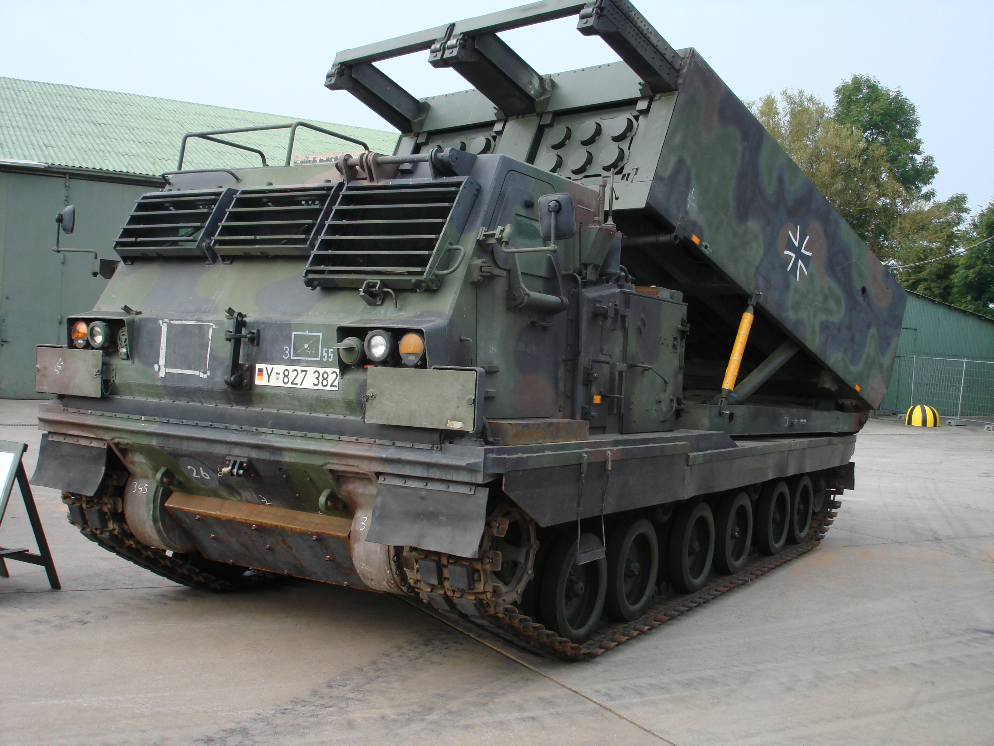 Mittleres Artillerie-Raketen-System der Bundeswehr während einer statischen Waffenschau der WTD 41 in Trier.